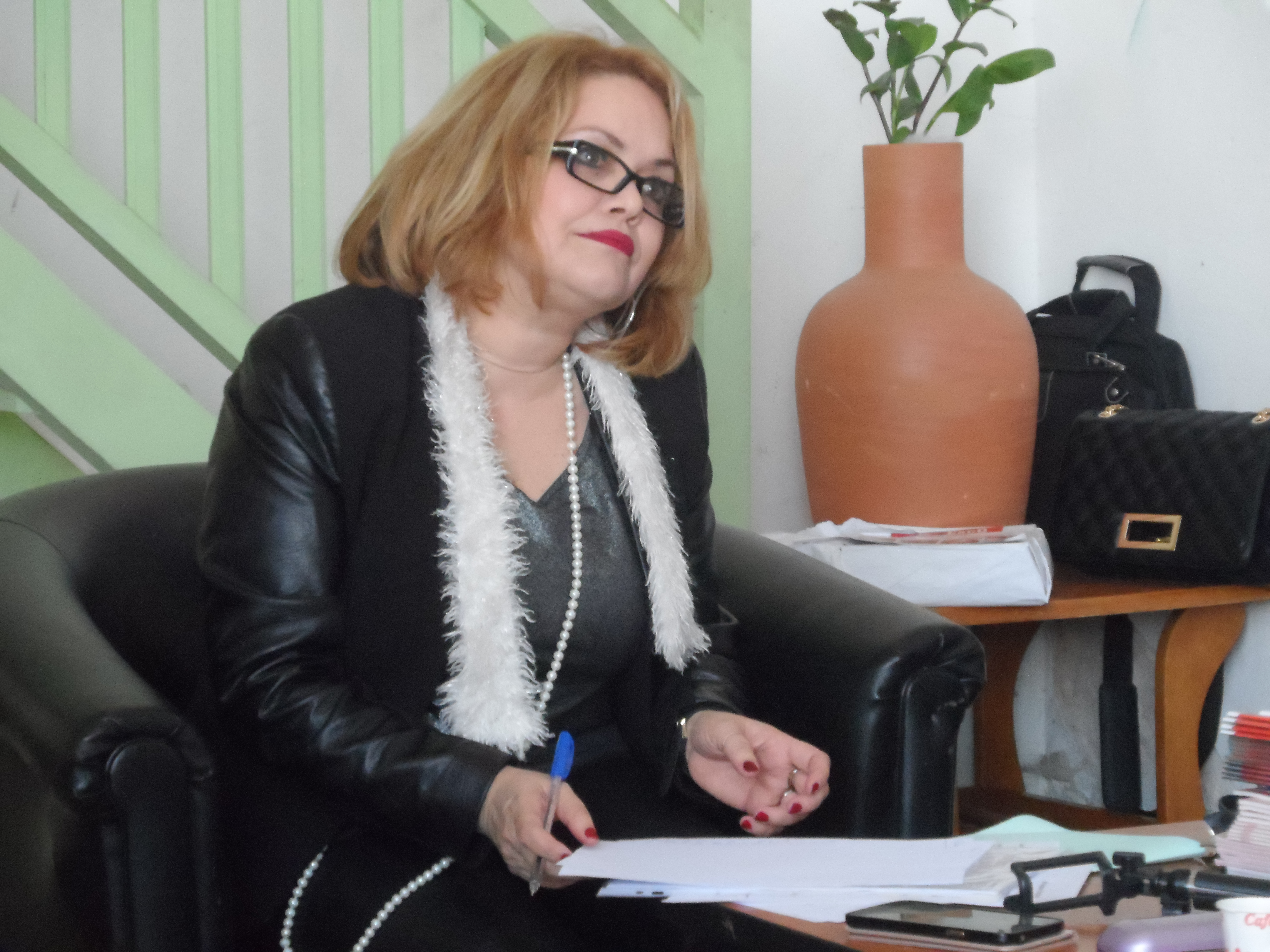 Au Forum littéraire organisé par le magazine L'ivrEscQ, journée dédiée à la femme du 8 mars 2017 à l'Agence Algérienne du Rayonnement Culturel